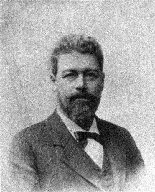 Österreichischer Politiker, Reichsratswahl 1907, Name siehe Dateiname